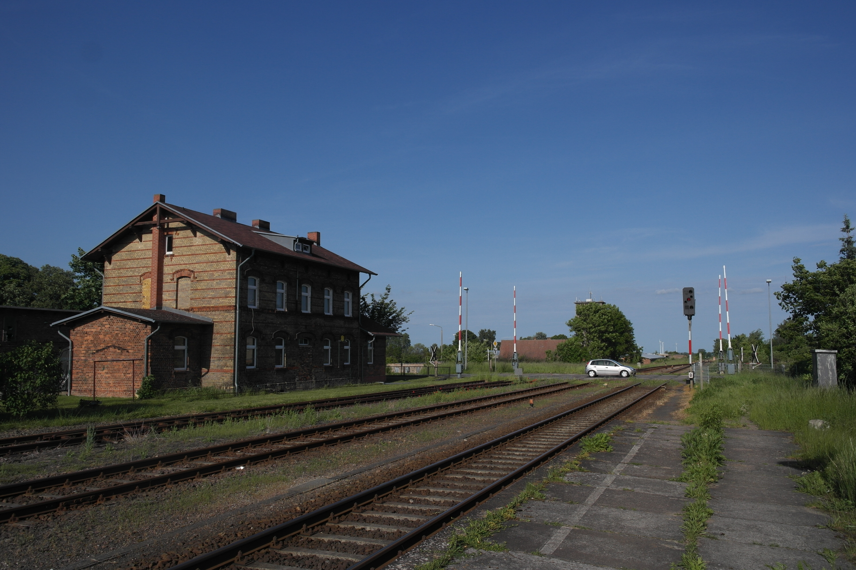 denkmalgeschütztes Eisenbahnerwohnhaus am Bf. Strasburg, Schwarzer Weg